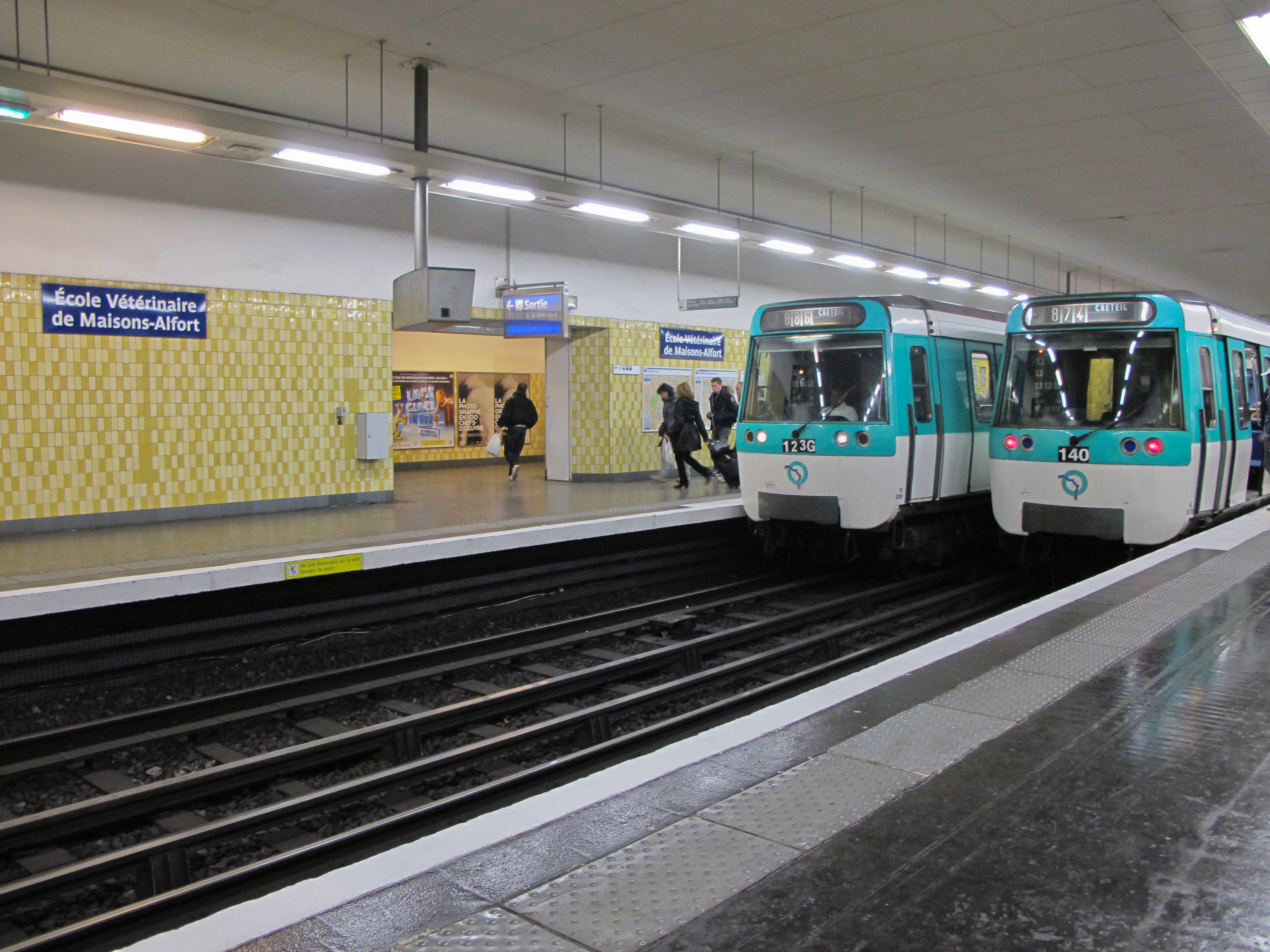 Station École Vétérinaire de Maisons-Alfort. Ligne 8 du métro de Paris - Maisons-Alfort., France